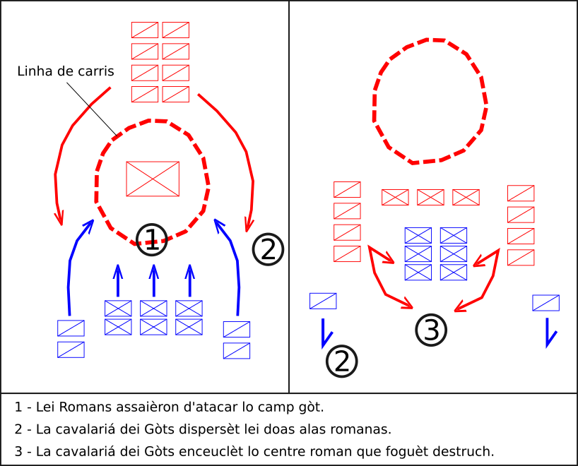 Esquèma simplificat de la batalha d'Andrinòple.